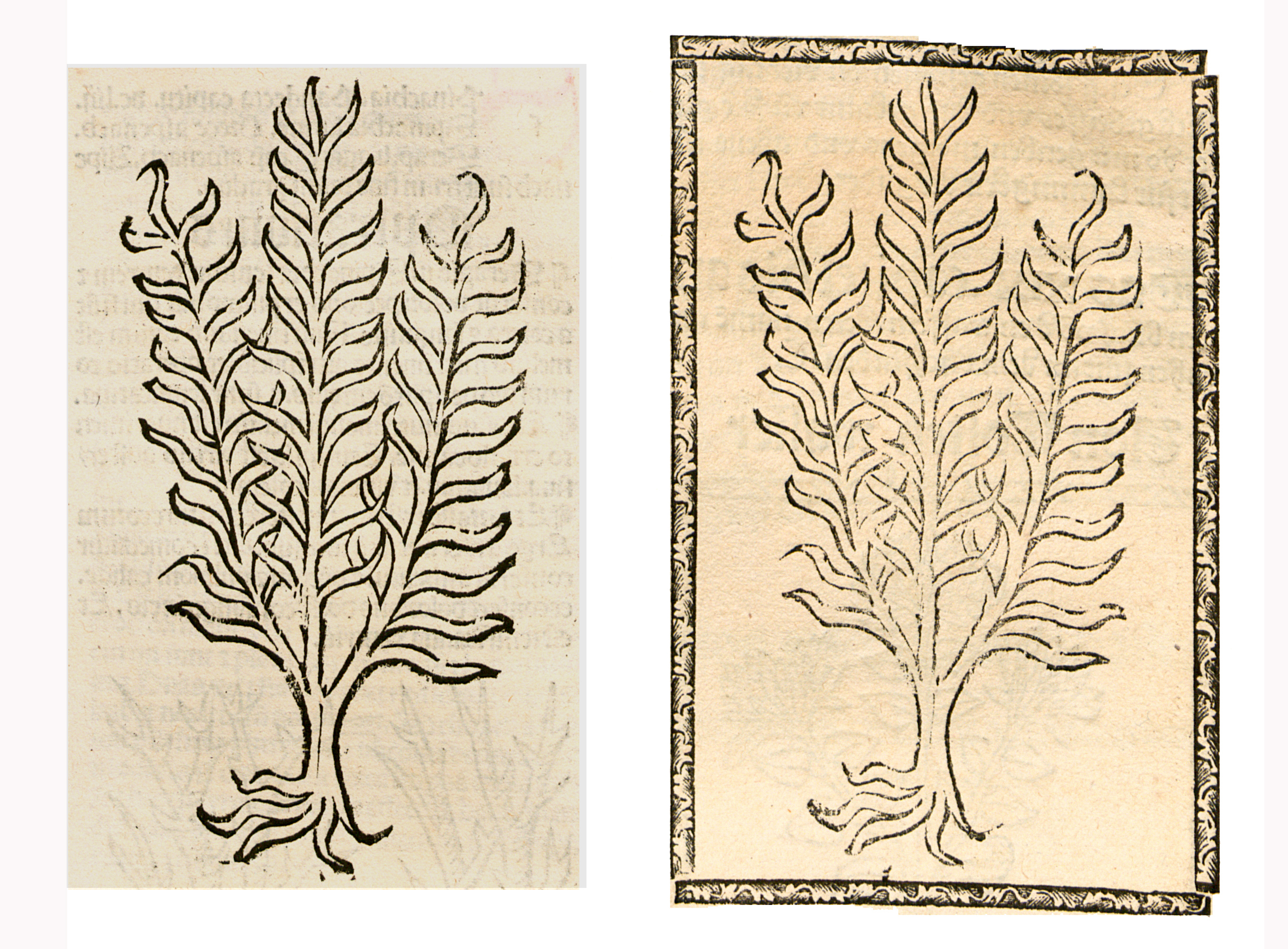 Abbildung vonː Sprinck Krut (Euphorbia lathyris)